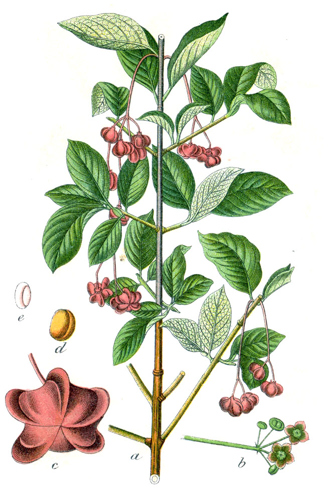 Euonymus latifolius (L.) Mill., syn. Euonymus latifolia (L.) Mill. Original Caption Breitblättriger Spindelbaum, Evonymus latifolia